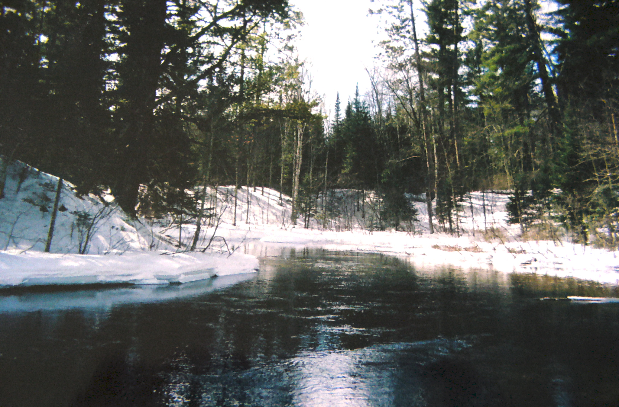 At hwy. B landing (Winneboujou)